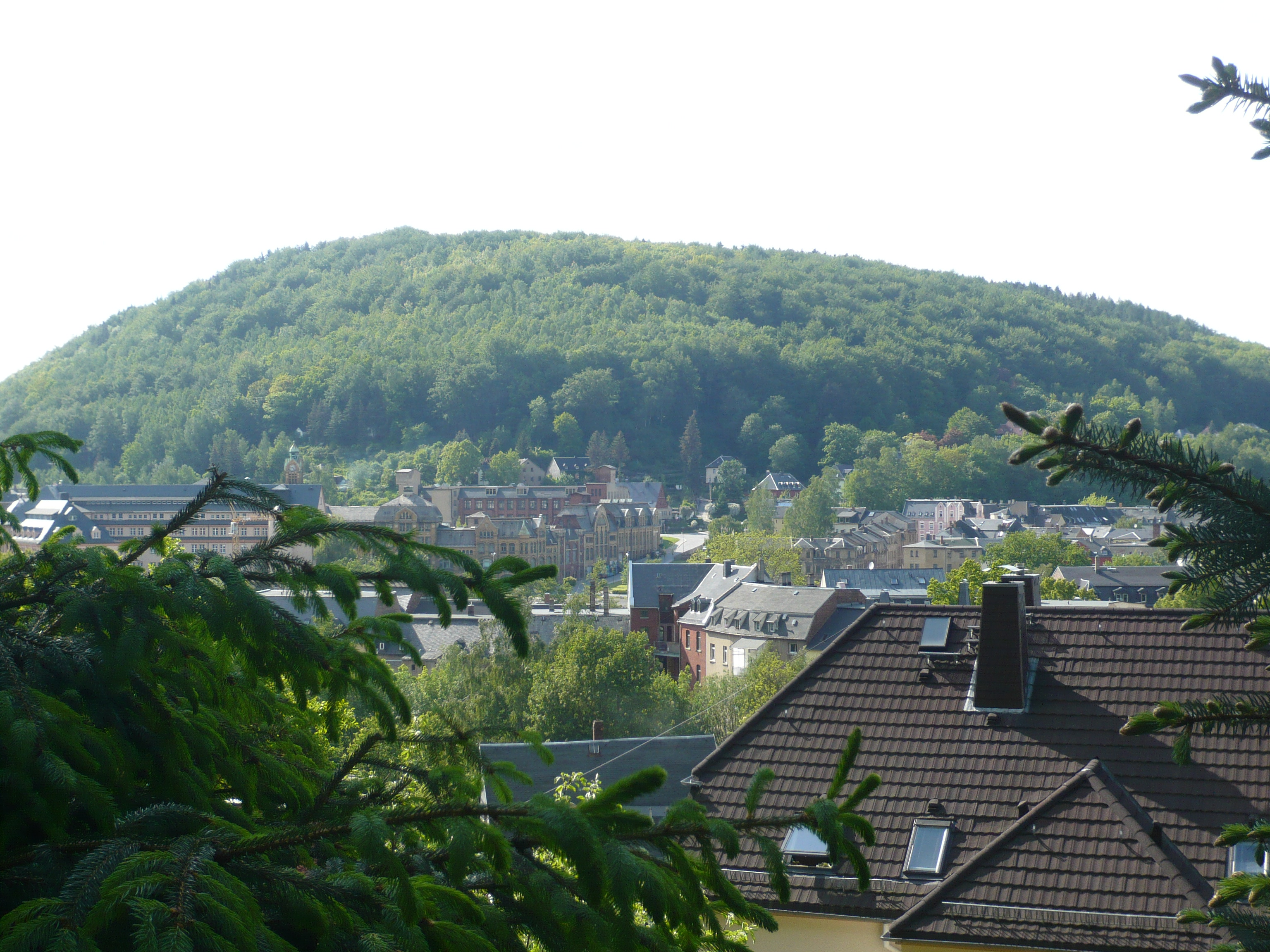 Stadt Aue, Umgebender Berg